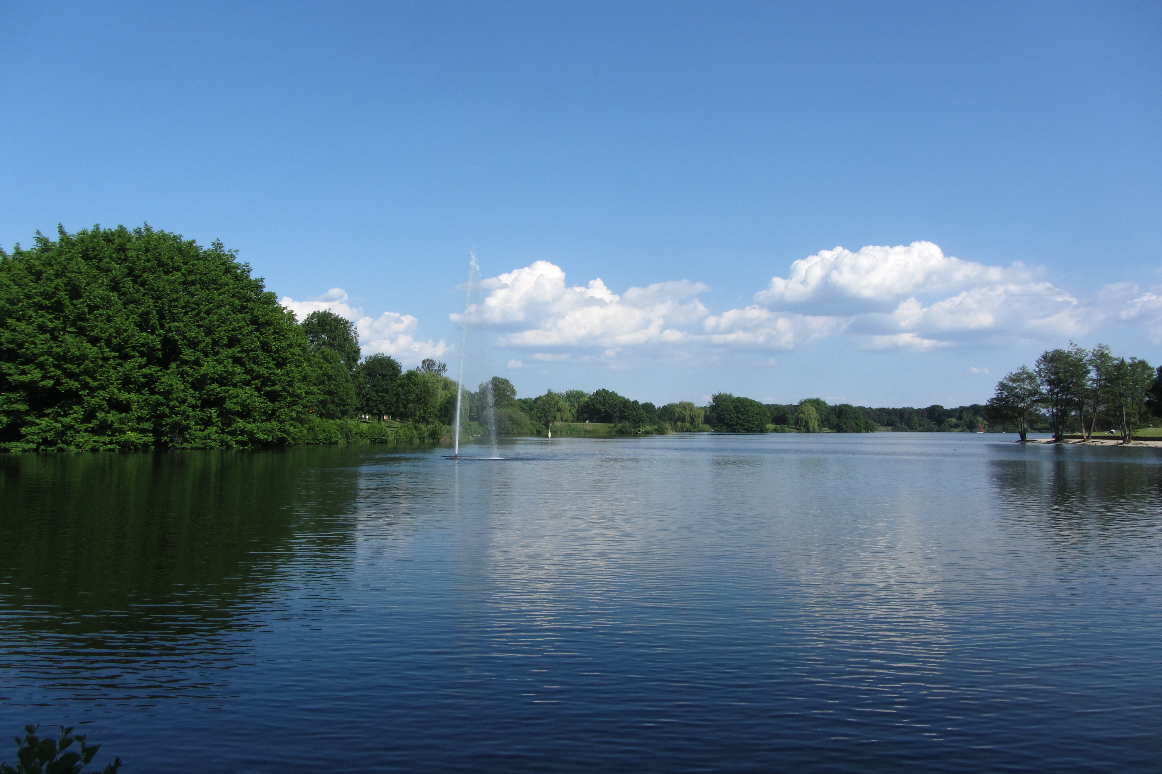 Aasee in Bocholt im Mai 2012, Blick von der Uhlandstraße Richtung Südosten